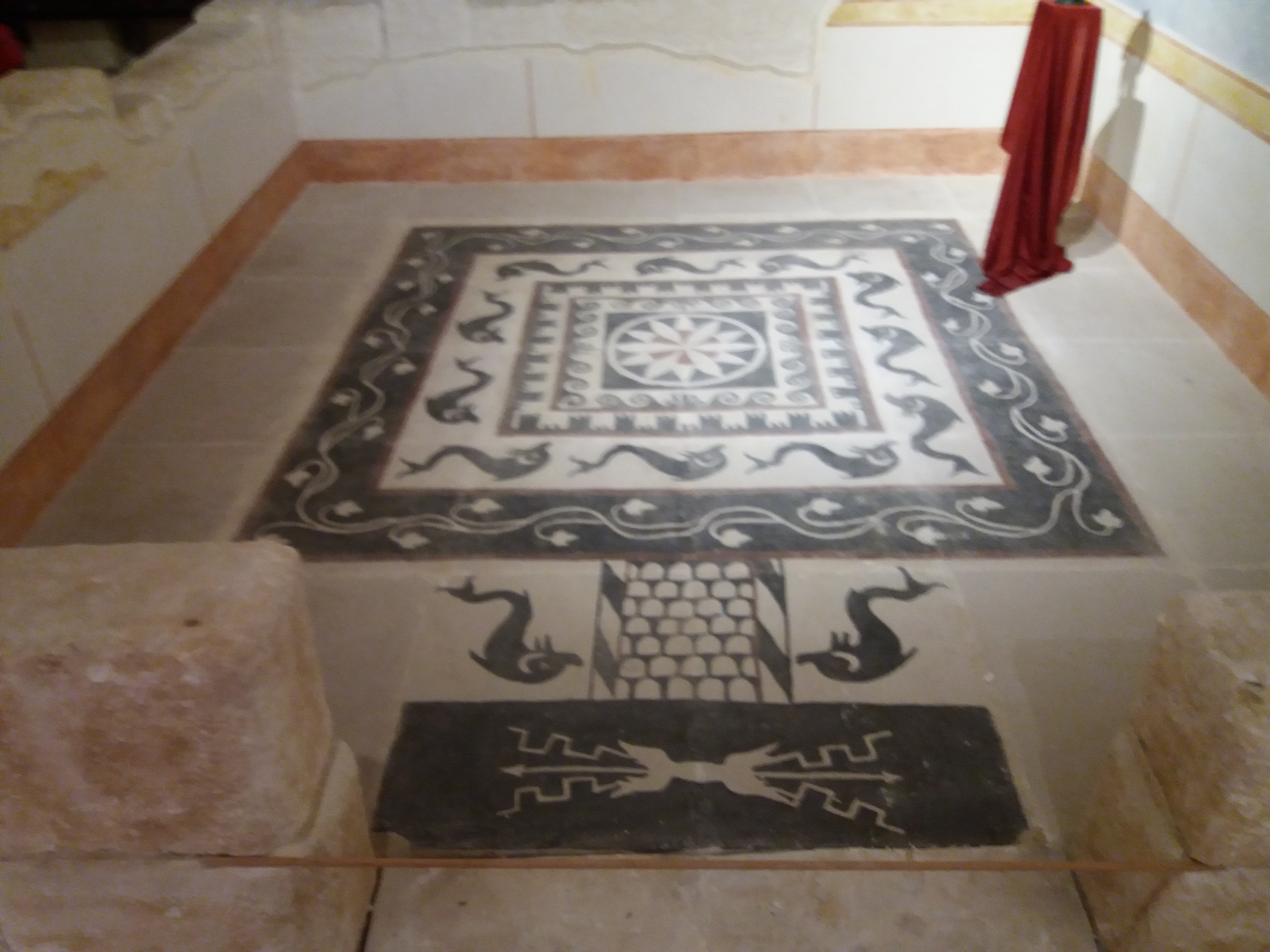 Sulmona: Museo civico